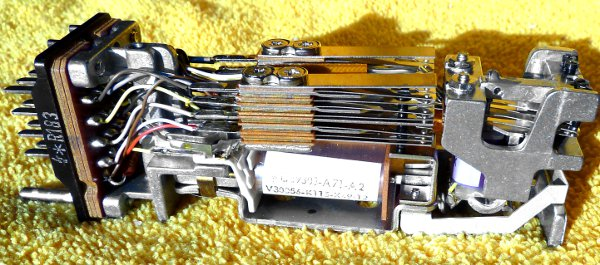 Das Bild zeigt das Prüfrelais aus dem EMD System 55. Es sind zwei Relais in einer steckbaren Einheit eingebaut. Die große Spule ist von der Bauart ein normales Flachrelais und wird als Ph (Prüf Hilfsrelais) bezeichnet. Das schnelle Relais (P) ist im oberen Teil und fast nicht zu sehen. Es ist nur die Spule mit der Beschriftung 12 zu erkennen.